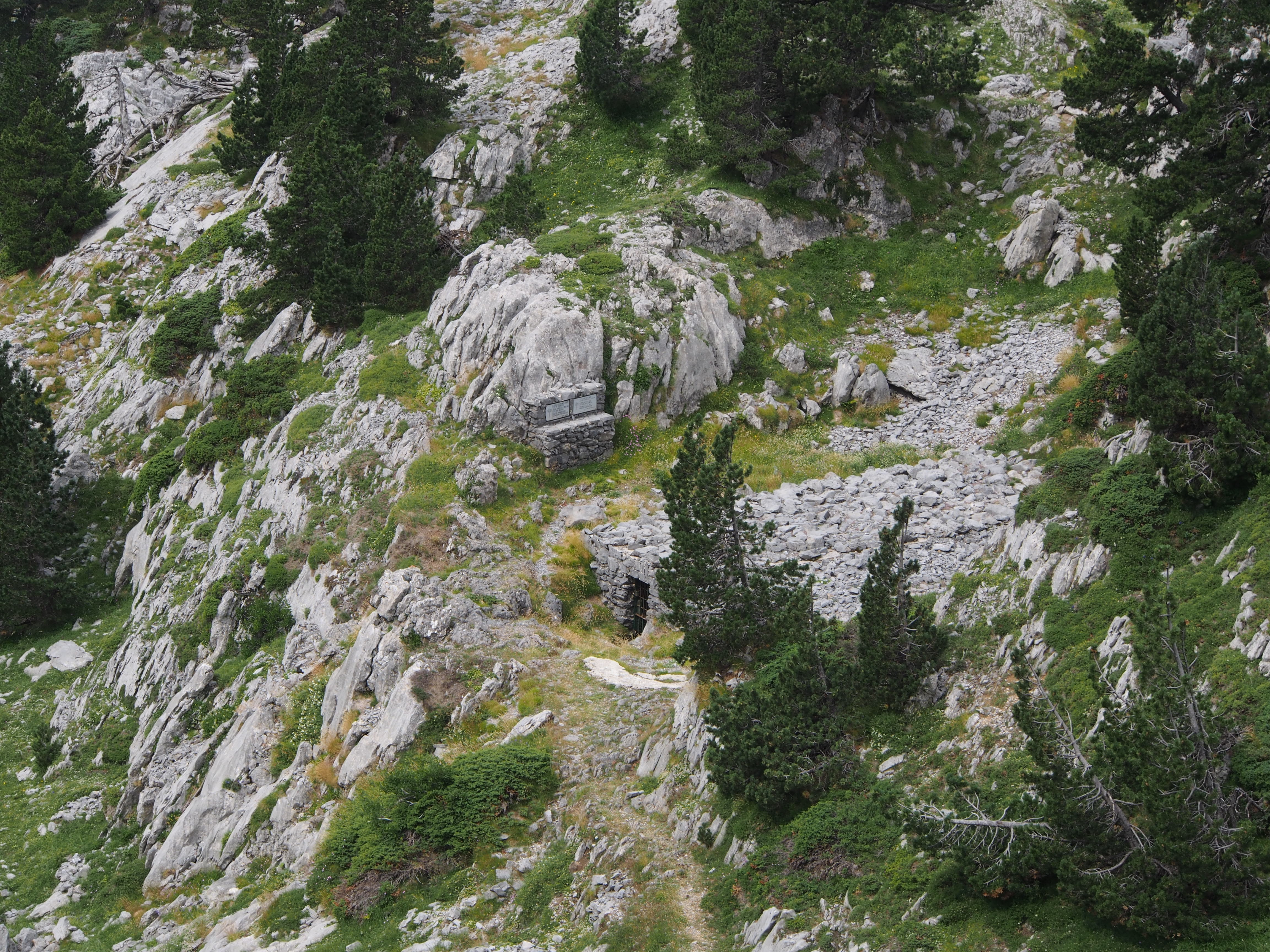 Entrée du gouffre Lépineux en contrebas de la route , quelques centaines de mètres après la frontière Espagnole .